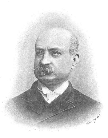 Retrato de Fidel de Sagarmínaga, en La Ilustració Catalana.